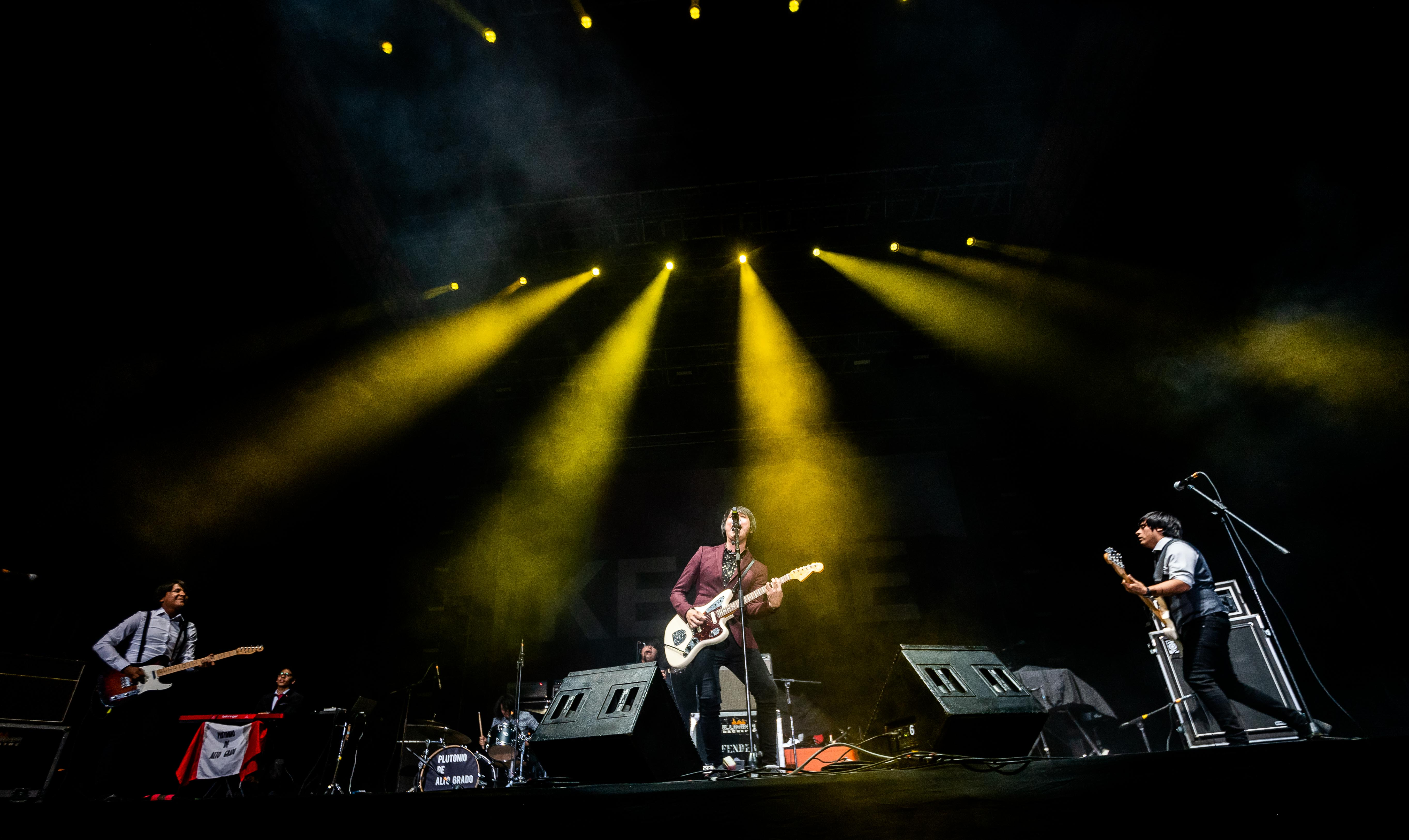 La banda Plutonio de Alto Grado es uno de los grandes nuevo fenómenos musicales de la escena rockera en Lima, Perú. Han tenido shows masivos en todo el Perú, Mega Festivales como el Vivo x el Rock y teloneros de dos bandas internacionales famosas mundialmente.